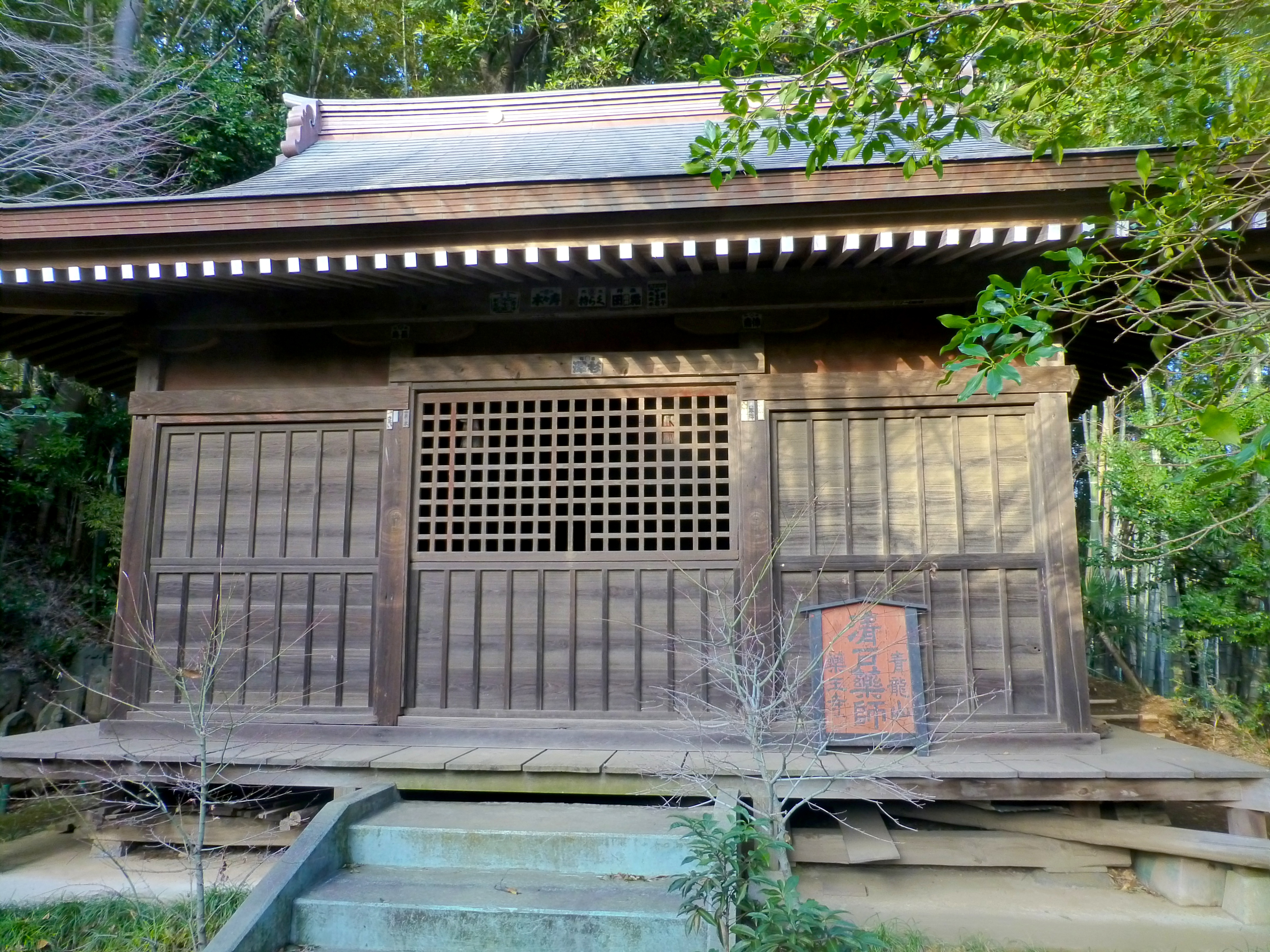 薬王寺（やくおうじ）は、千葉県白井市清戸にある天台宗の寺院。(Yakuou-ji is a temple in Shiroi, Chiba)